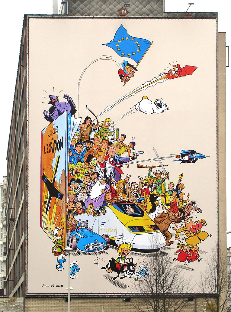 Mur peint à Bruxelles